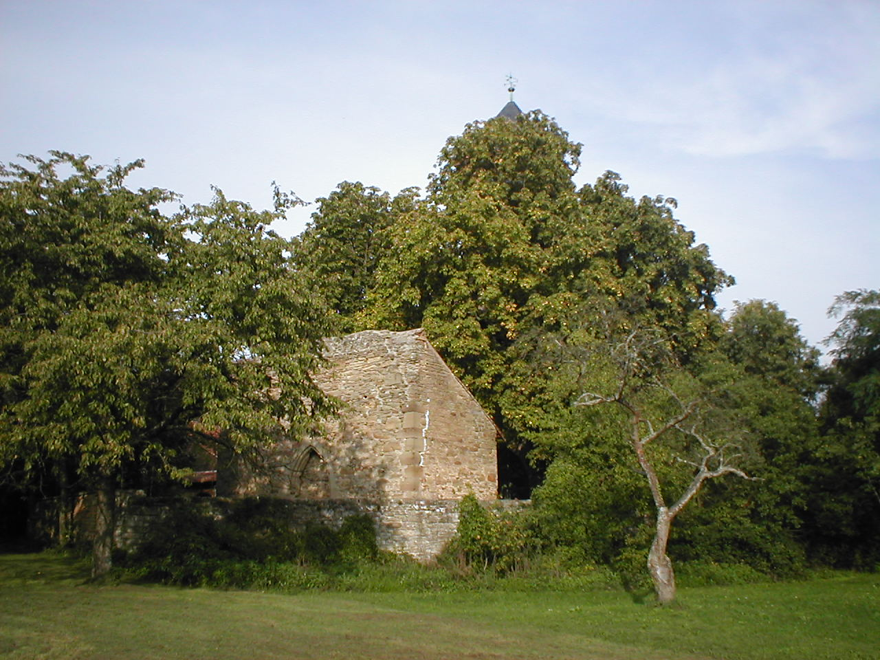 Wallfahrtskirche und historische Gebäudefragmente auf dem Ottilienberg bei Eppingen